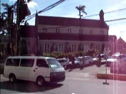 Kirche in Brown's Town, Jamaika / Church in Browns Town, Jamaica